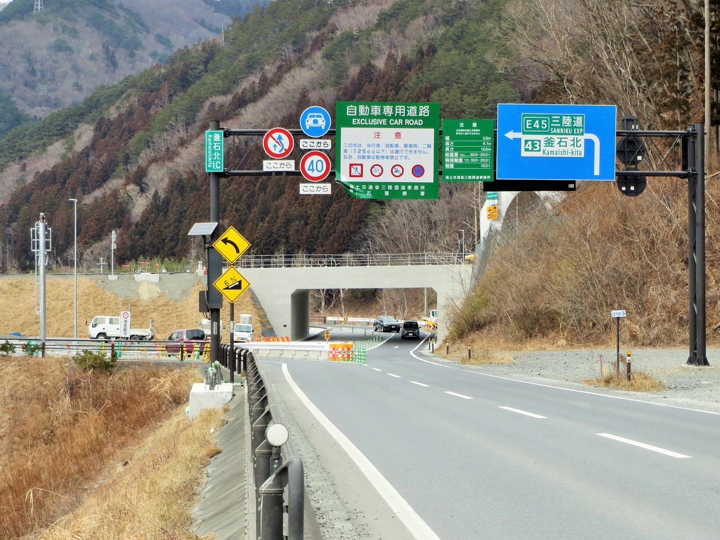 釜石北インターチェンジ Canon IXY 3